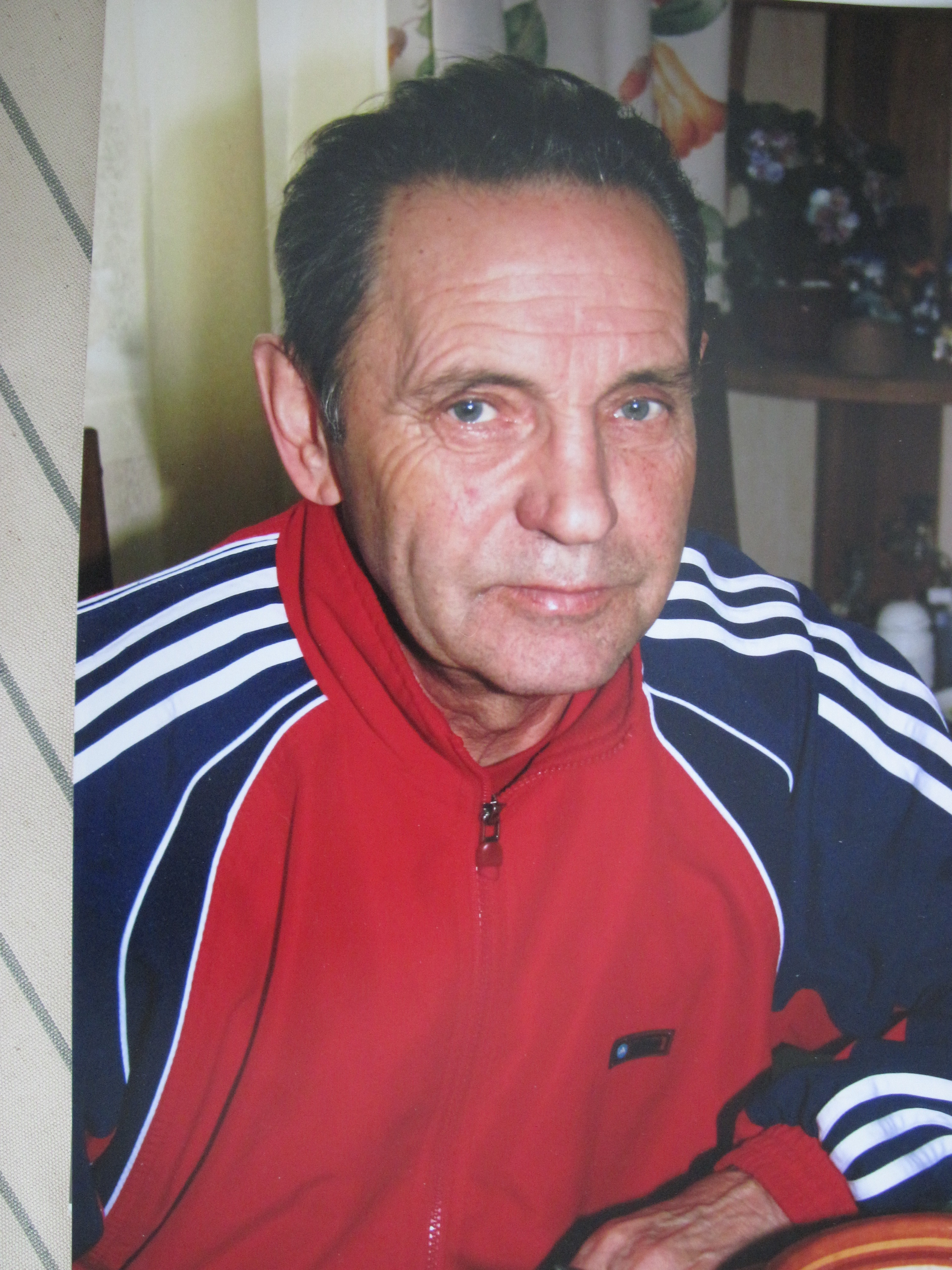 Елахов, Николай Андреевич